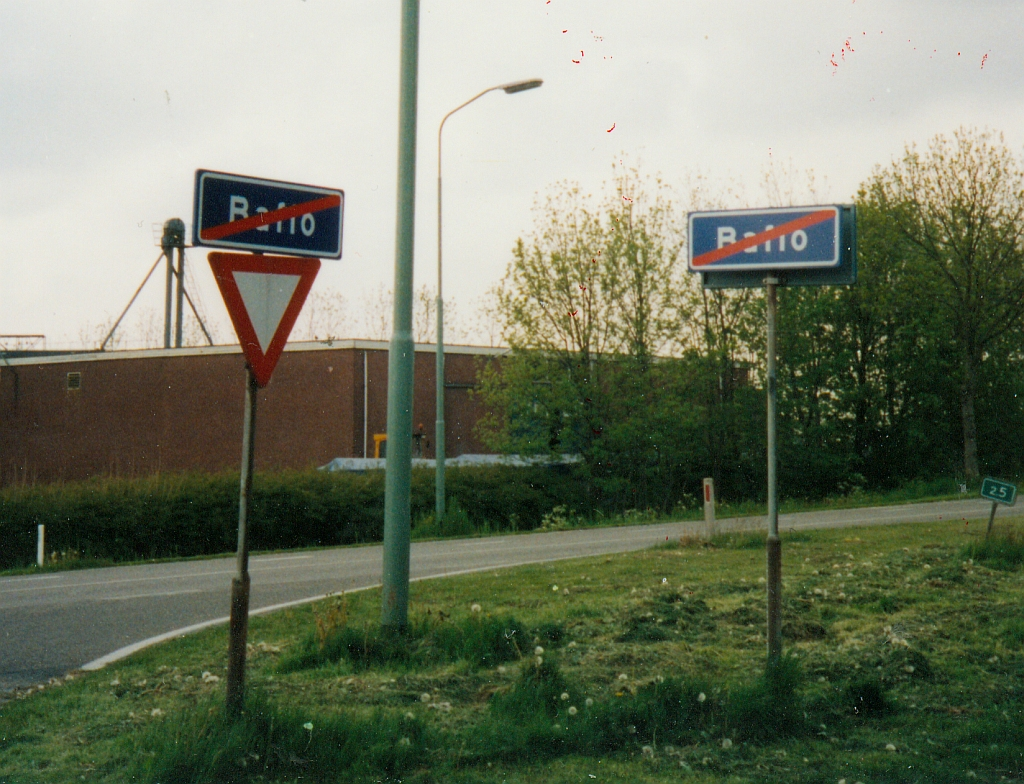 Einde bebouwde kom 'Rafio' (lees: Baflo)